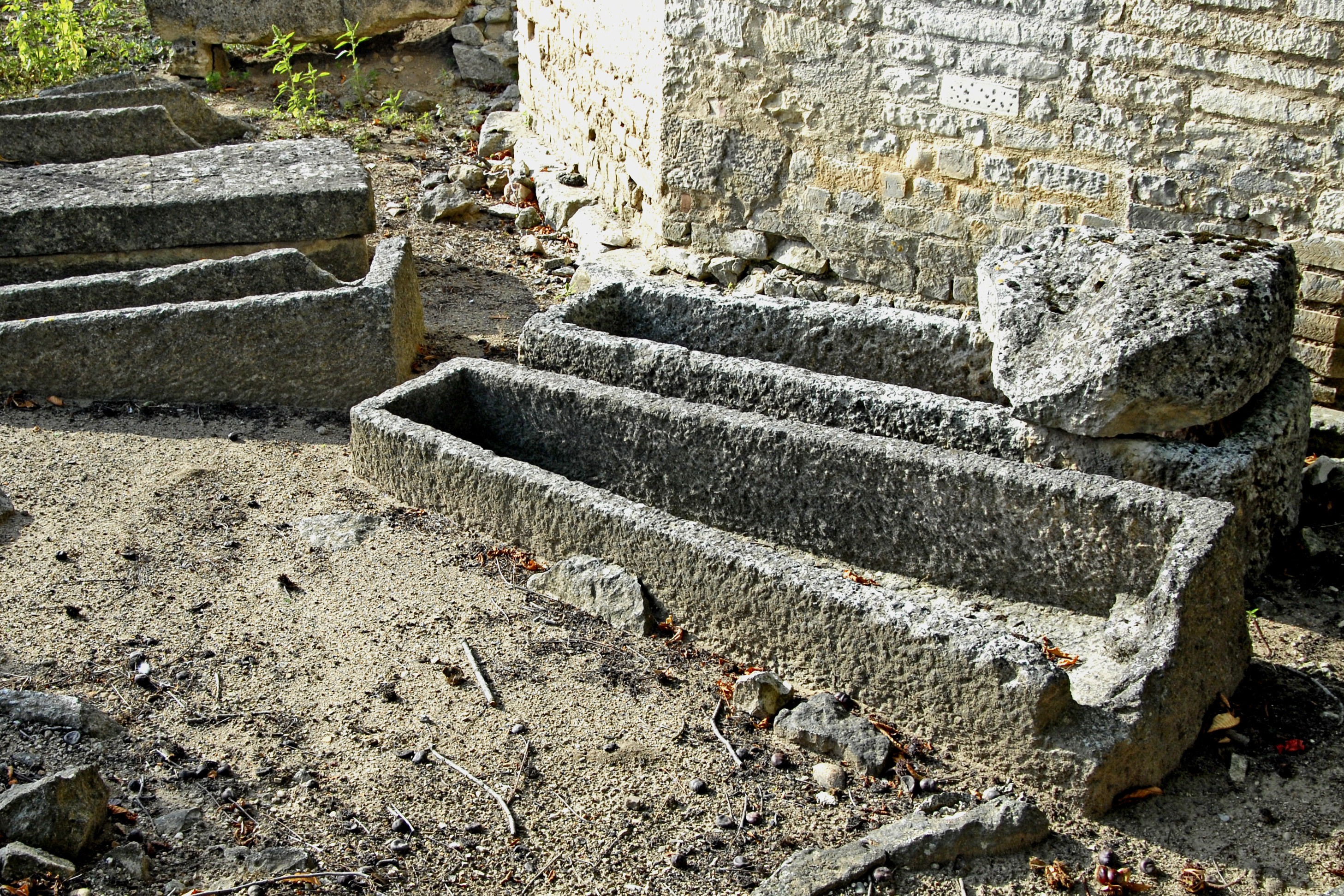 Civaux, merow. Steinsärge neben Dorfkirche